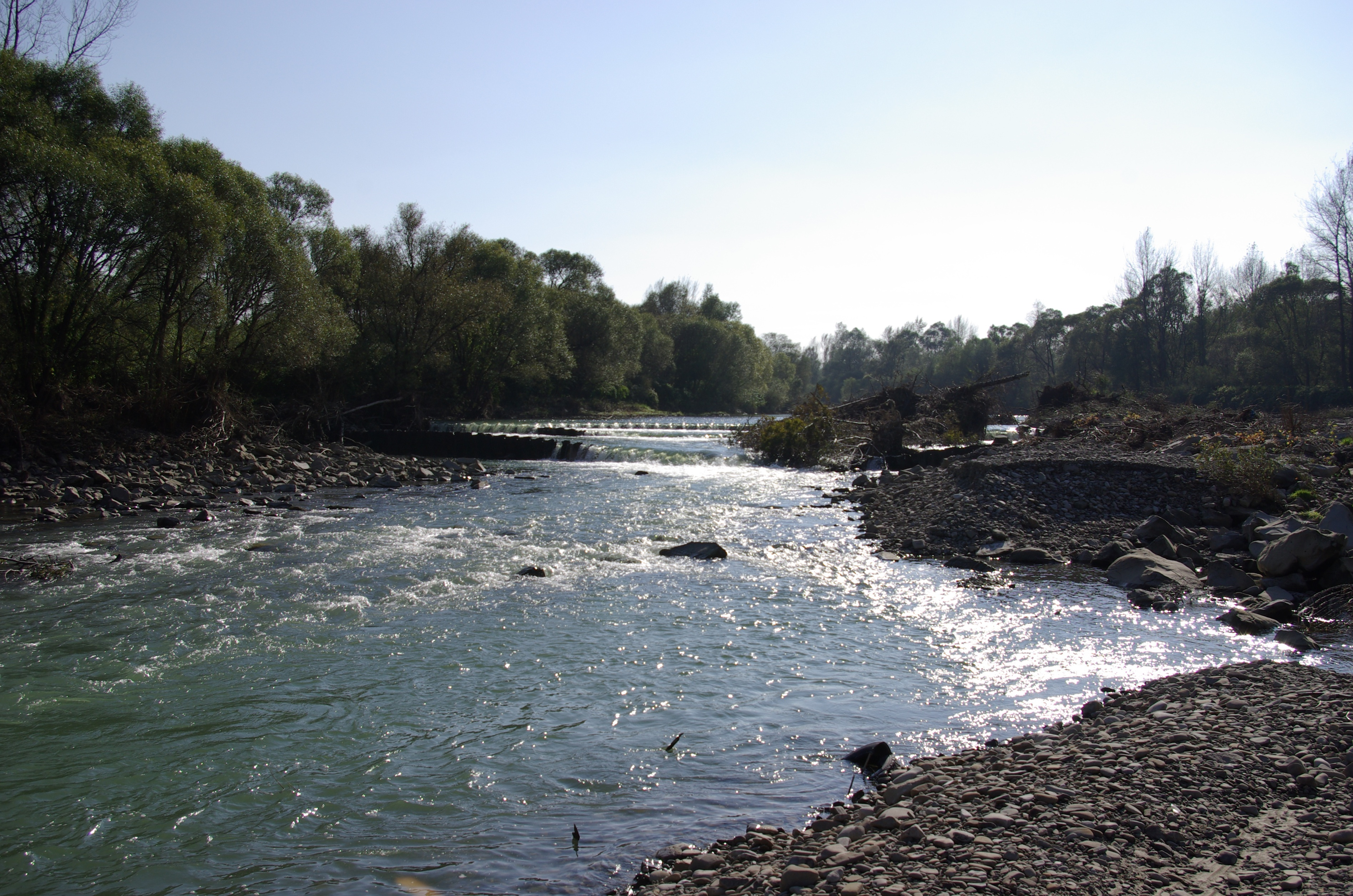 Soła na Zasolu Bielańskim